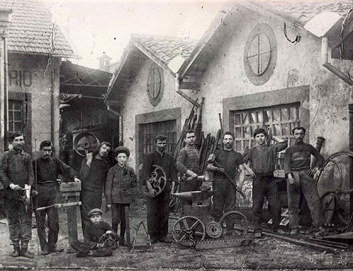 Alcuni operai della ditta Comerio Ercole nel 1885, anno della sua fondazione.